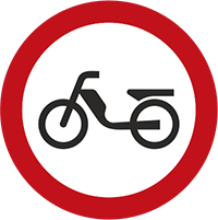 Diagramme de la signalisation routière luxembourgeoise